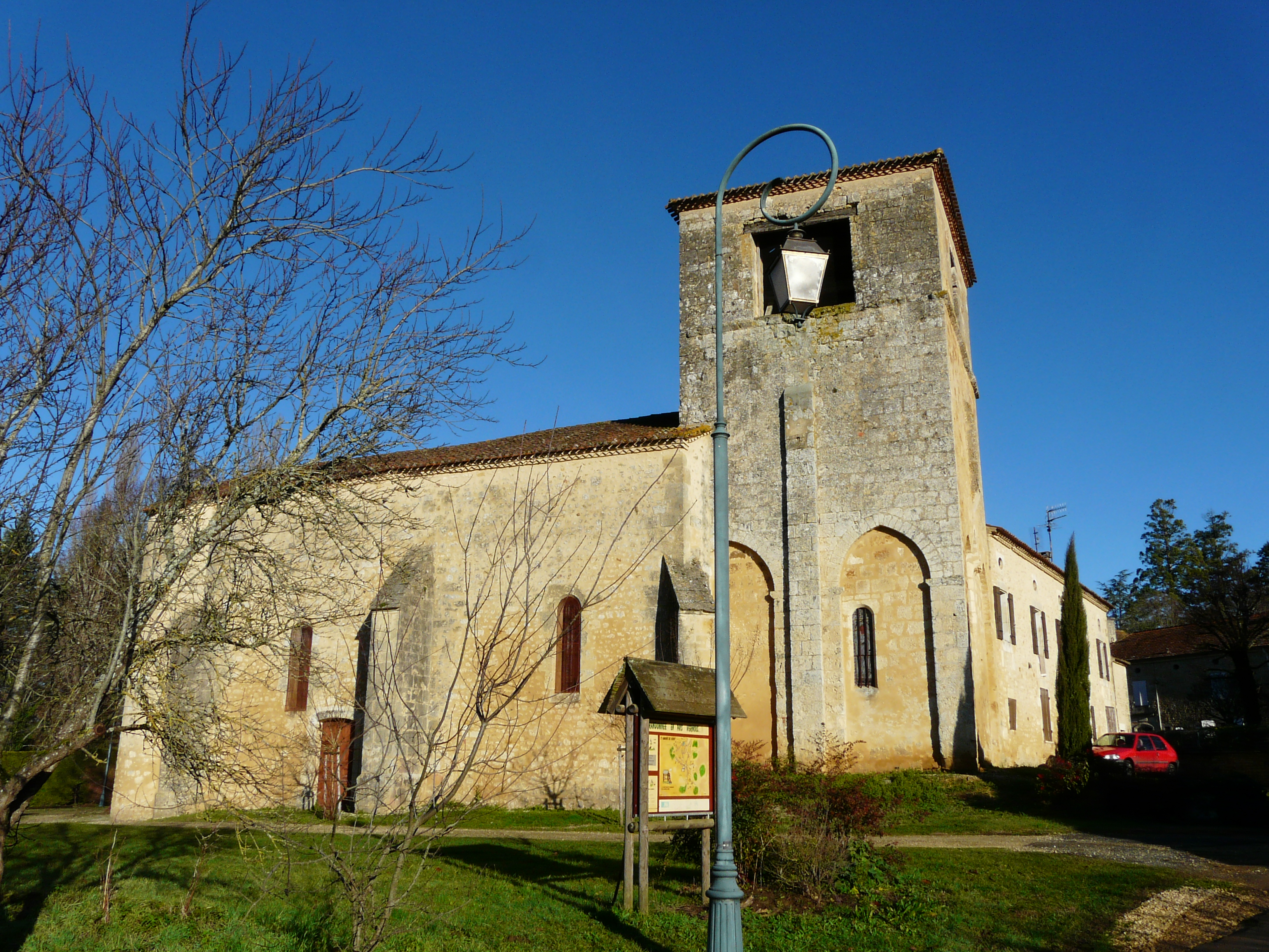 L'angle sud-est de l'église Saint-Amand, Saint-Amand-de-Vergt, Dordogne, France.